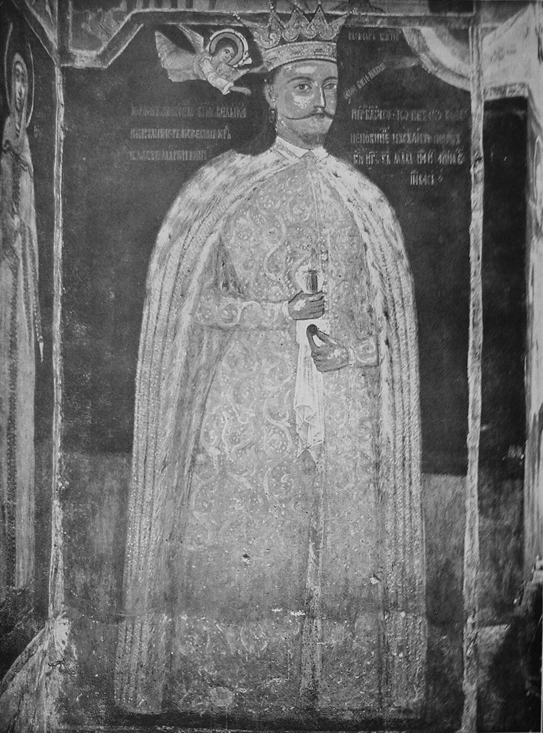 Petru Cercel in Căluiu monastery